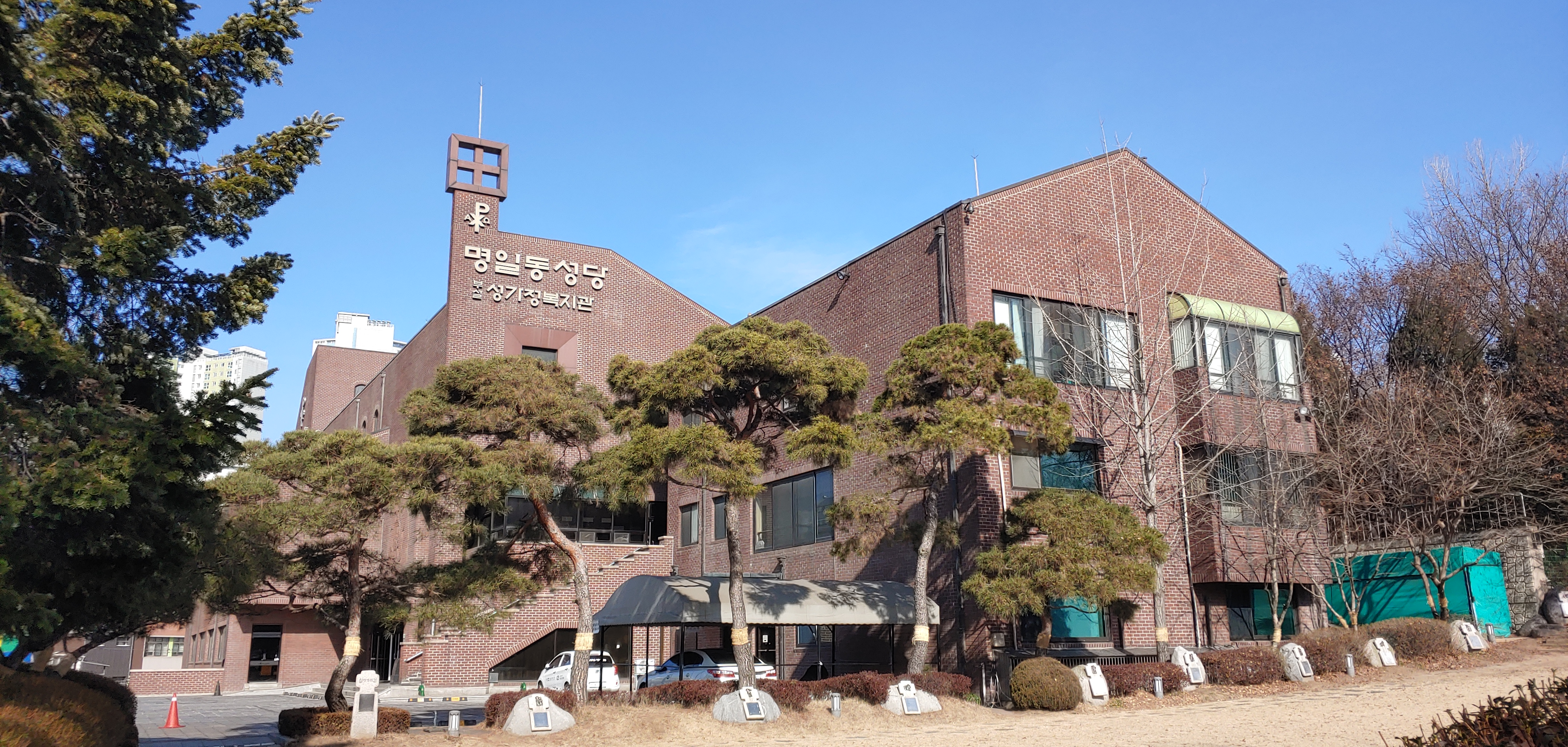 명일동성당, 서울특별시 강동구 명일동